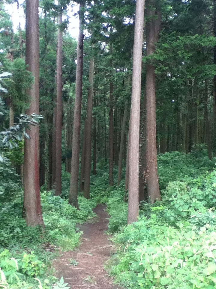 横浜市旭区矢指町の山林